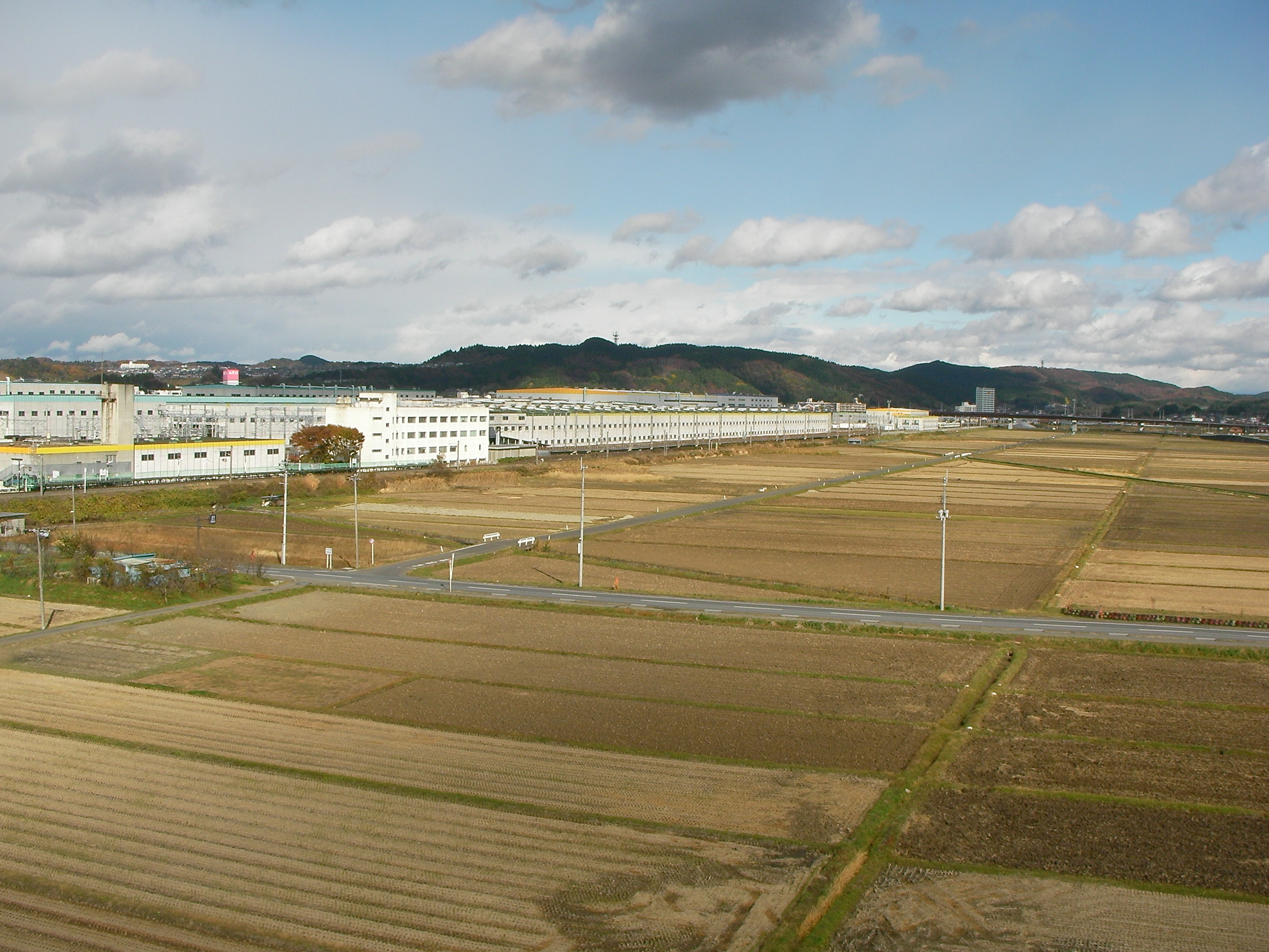 利府新幹線車両基地